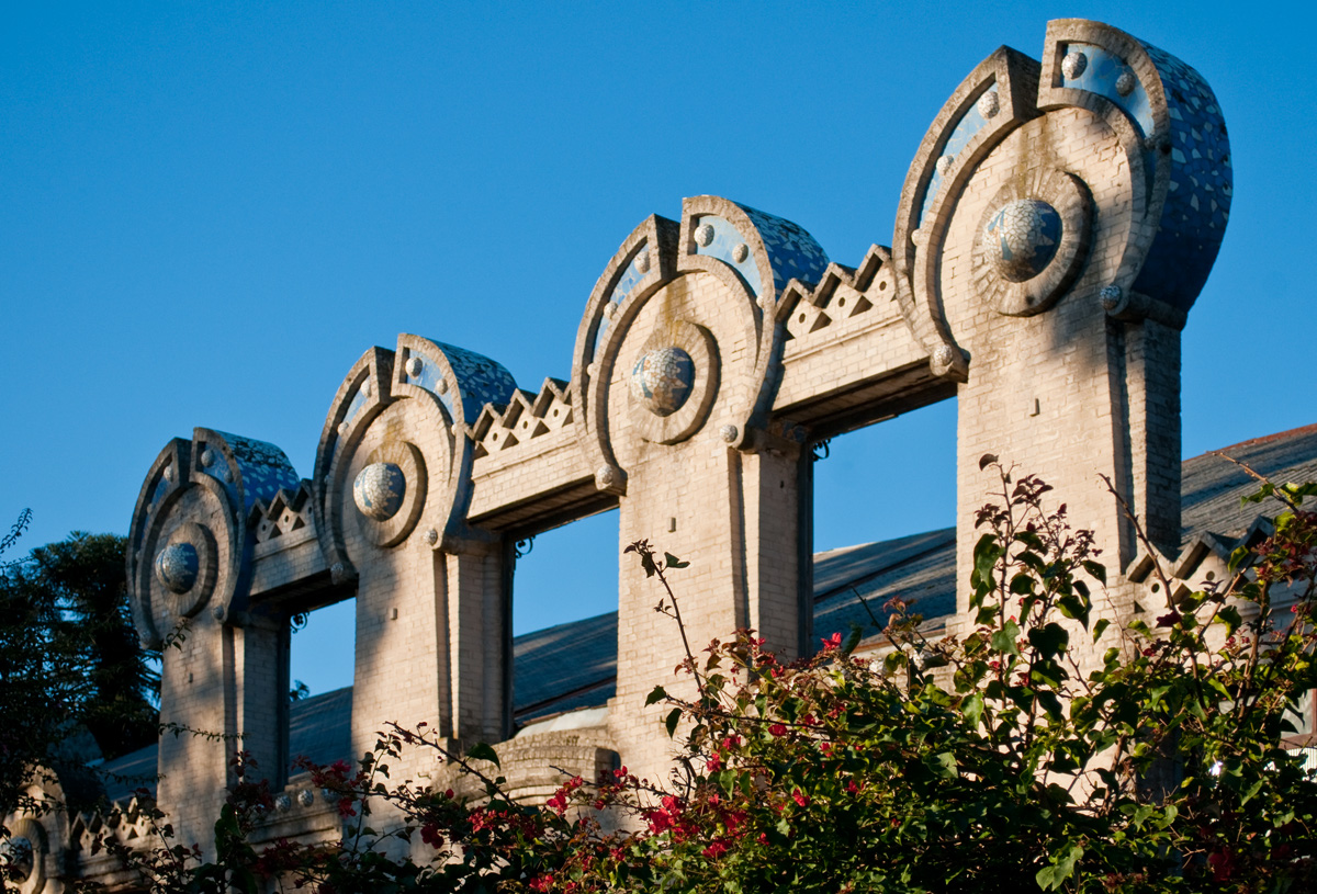 Parque El Prado. Ubicada en el departamento de Montevideo